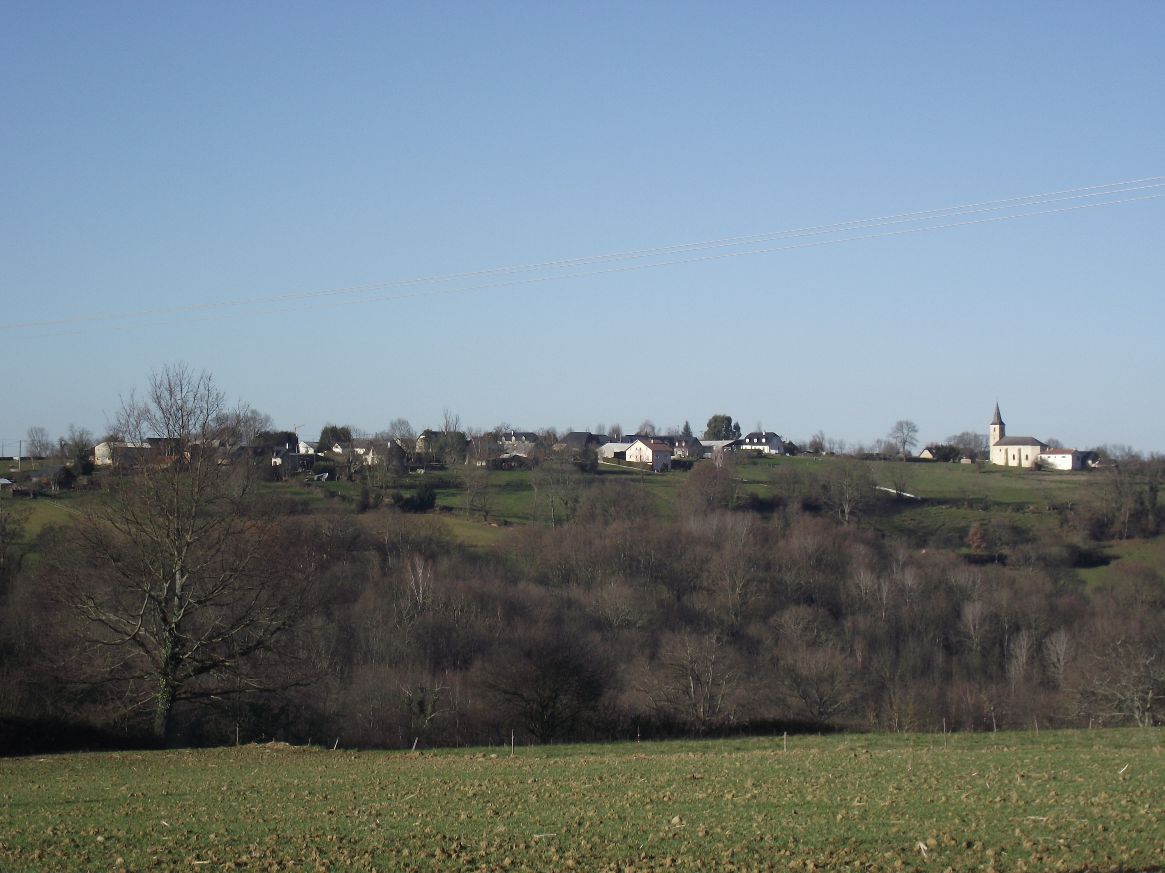 Le village de Chelle-Spou vu d'Artiguemy (Hautes-Pyrénées, France)